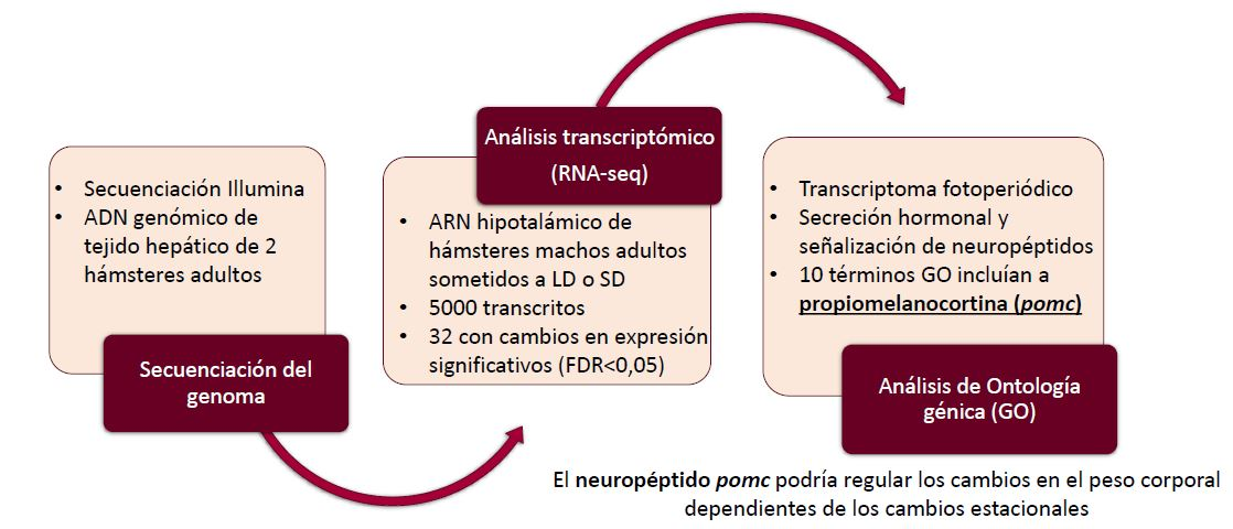 Flujo de trabajo para el análisis del genoma y del transcriptoma del hipotalámo fotoperiódico del hámster siberiano